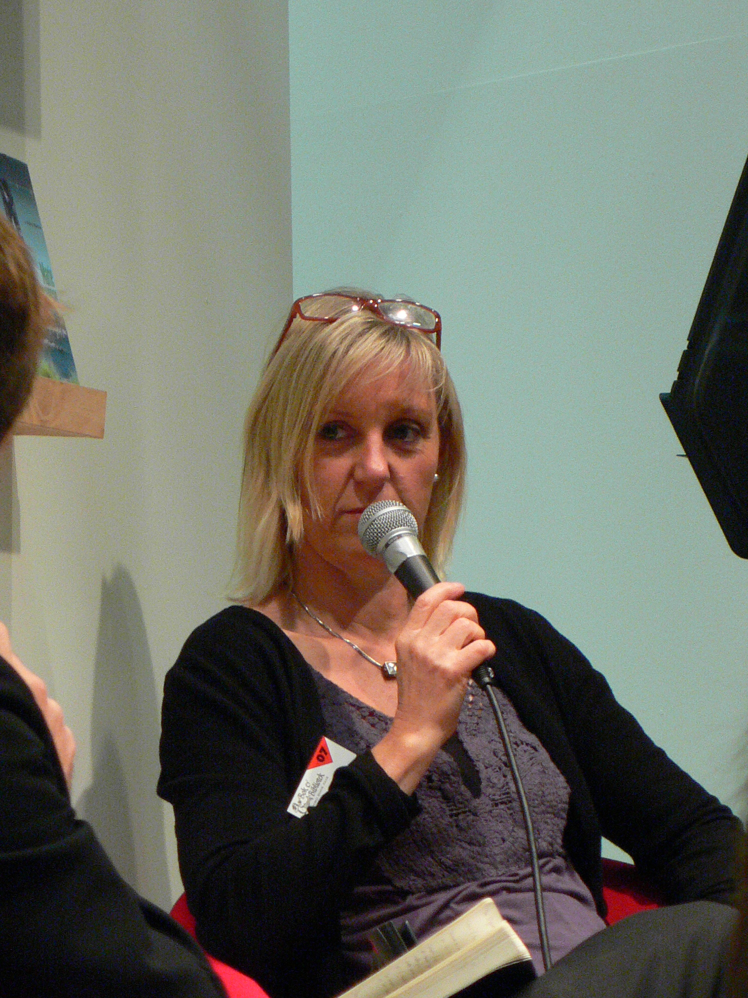 Marie Hermanson at Gothenburg Book Fair 2007, Marie Hermanson på Bok- och biblioteksmässan 2007